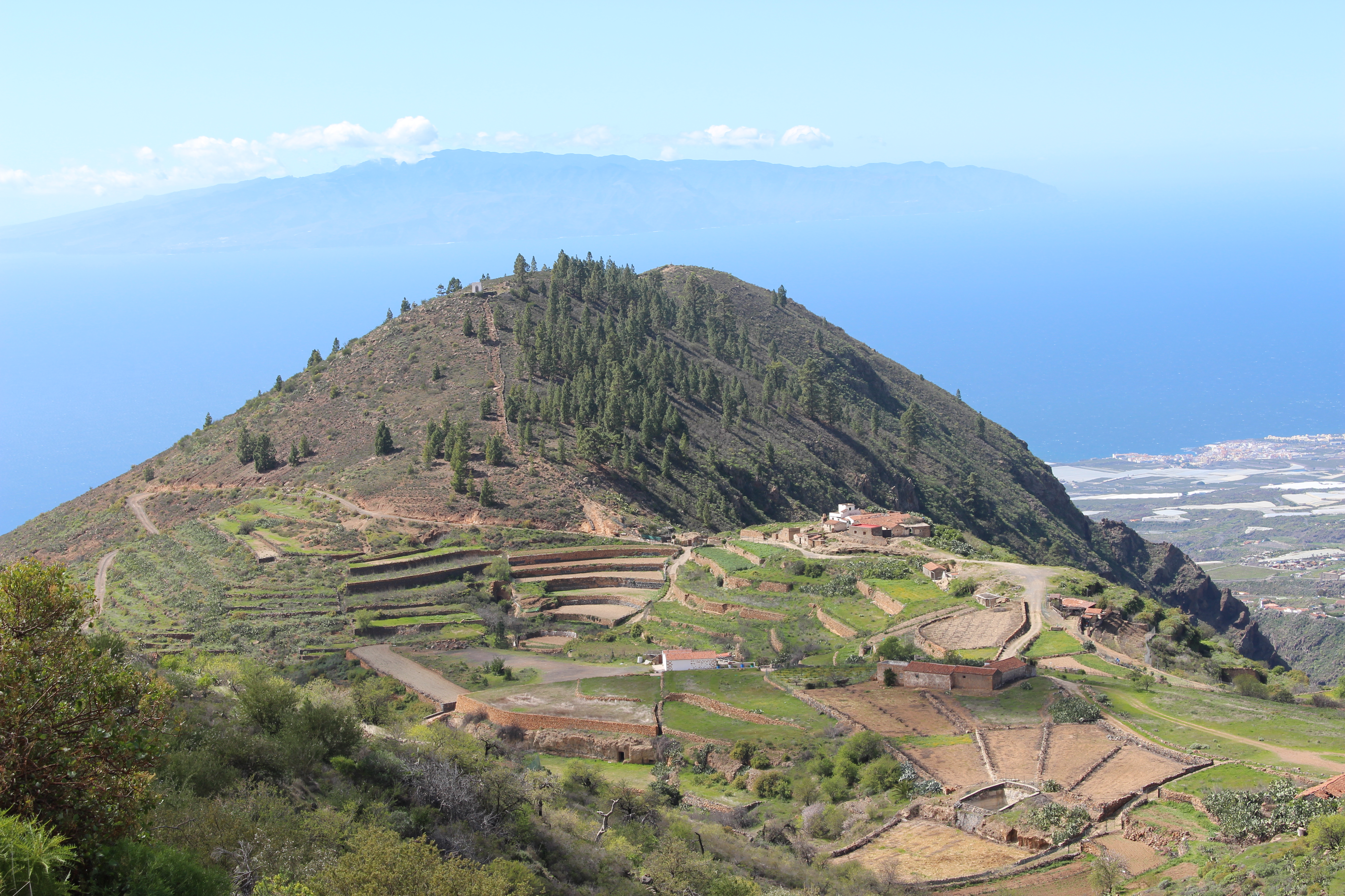 Caserío de Las Fuentes, Tenerife. Canarias.